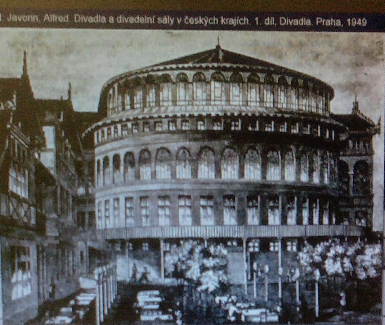 Fotografie z knihy, pořízená dne 29. 5. 2018